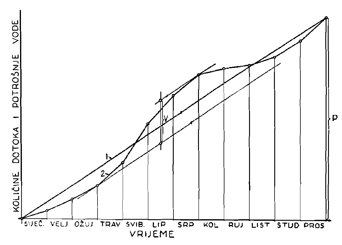 Cisterne